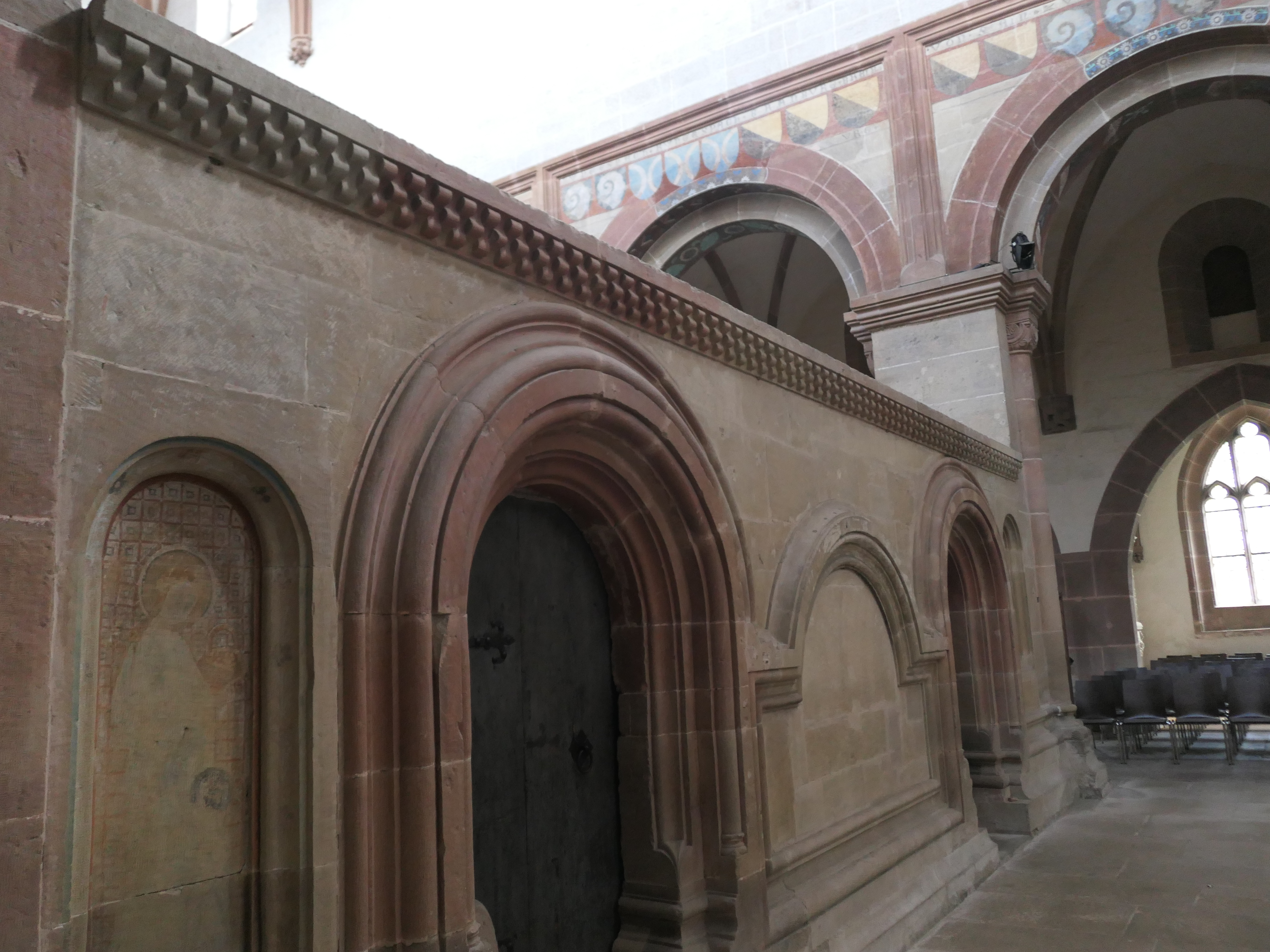 Interior of the church of Maulbronn Monastery Chorschranke romanisch mit Rollenfries und Malerei 15. Jahrhundert